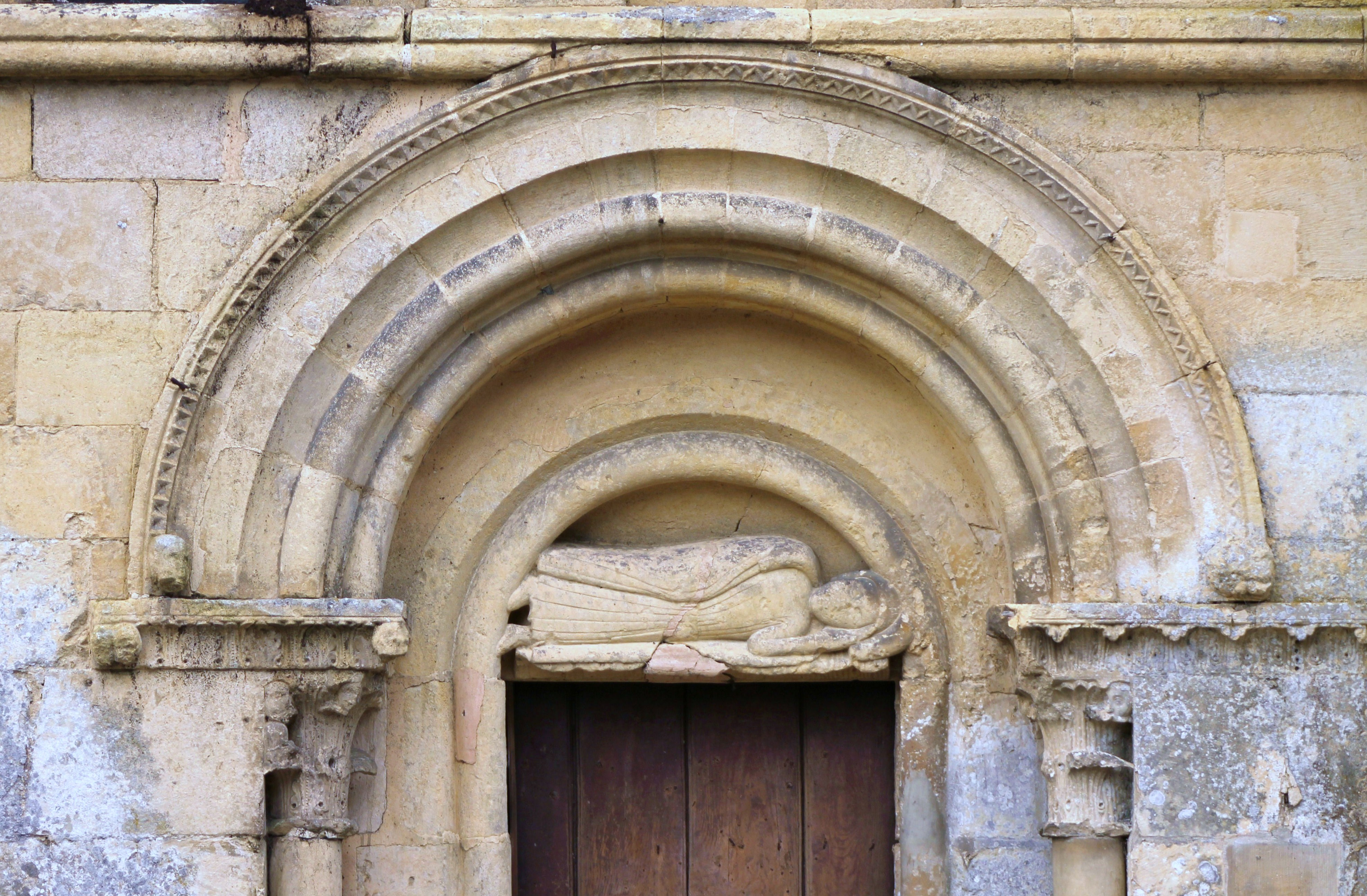 Portail nord, dans le tympan, représentation d'un moine couché et dormant, église Saint-Pierre d'Ouézy (Calvados) Base Mémoire